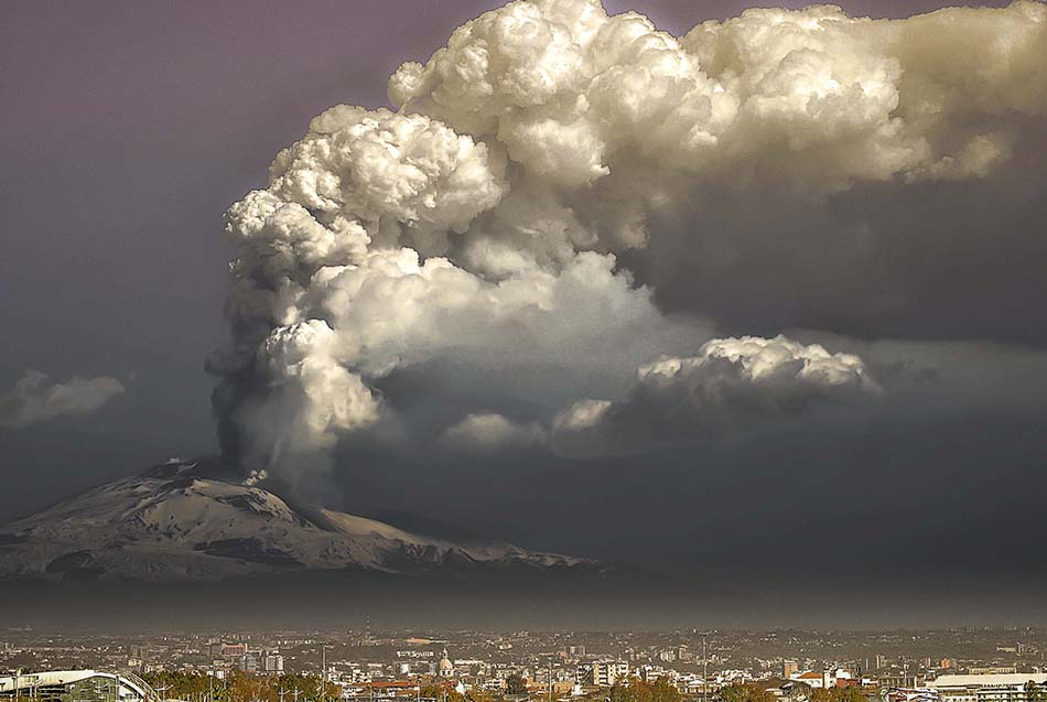 Parossismo